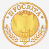 Емблема товариства "Просвіта"